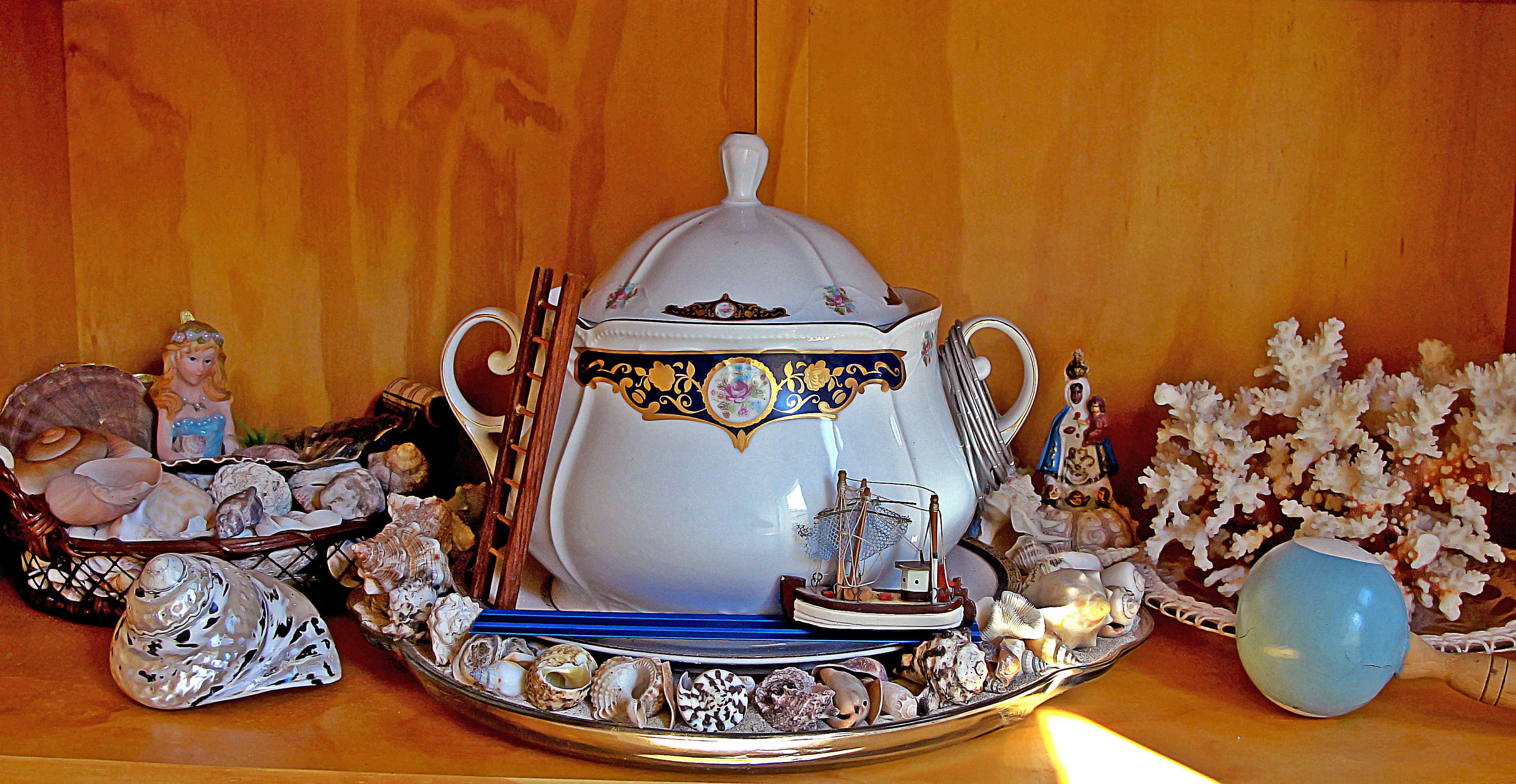 Igbá Yemanjá segundo a concepção da Santeria afro-cubana.